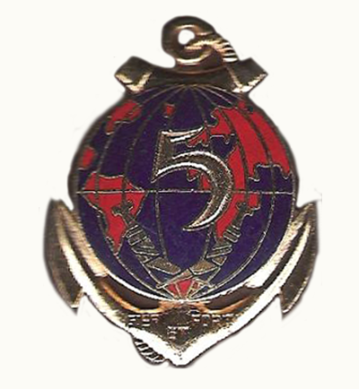 insigne régimentaire du 5e régiment interarmes d’outre-mer.